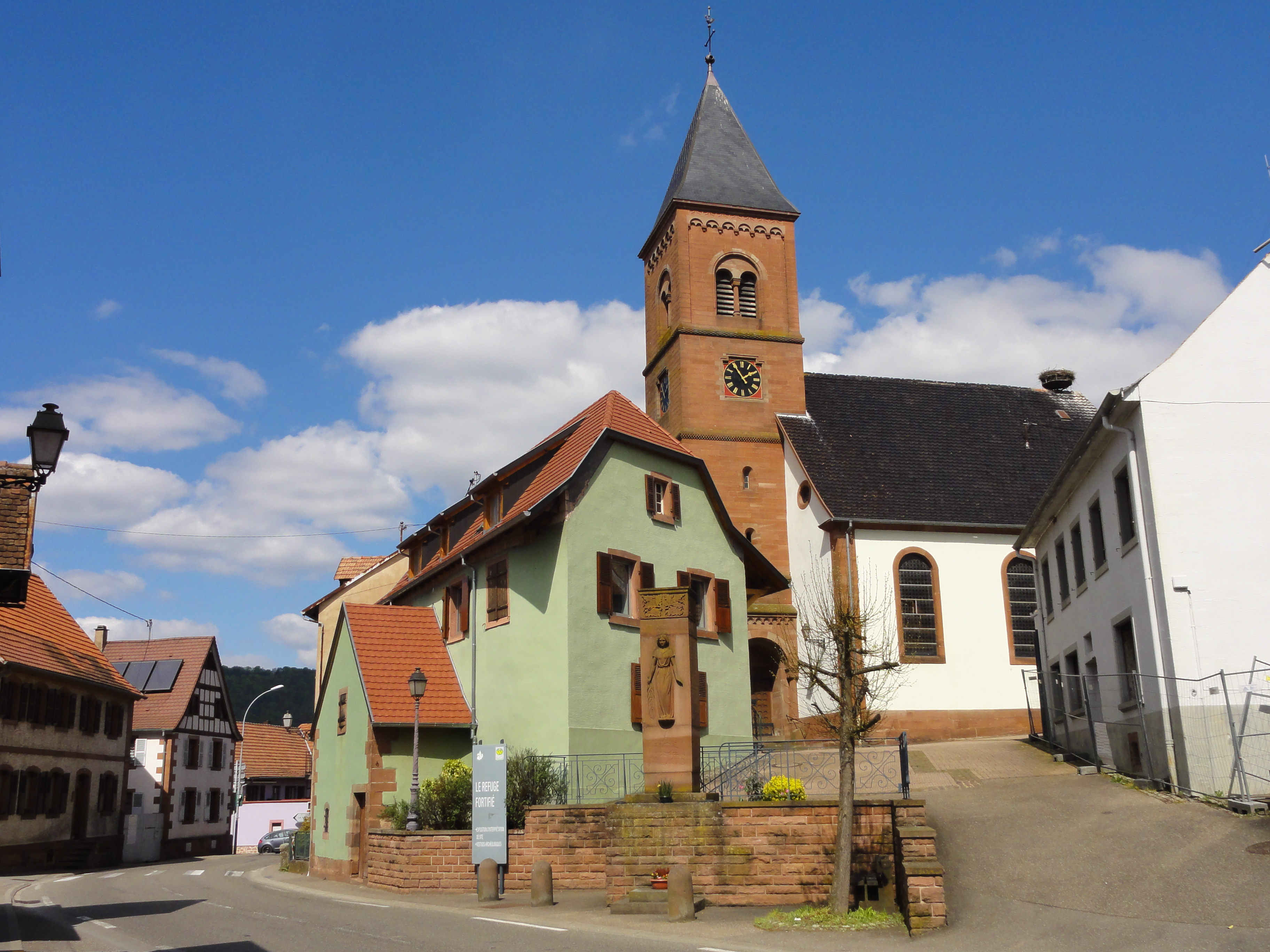 Alsace, Bas-Rhin, Dossenheim-sur-Zinsel, Église simultanée Saint-Léonard (XIVe-XXe)